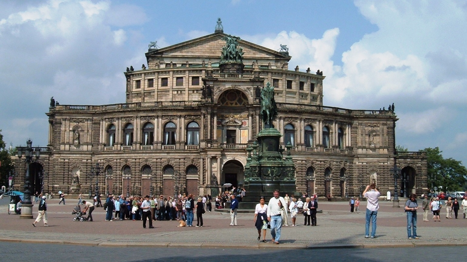 Frontalansicht der Dresdner Semperoper